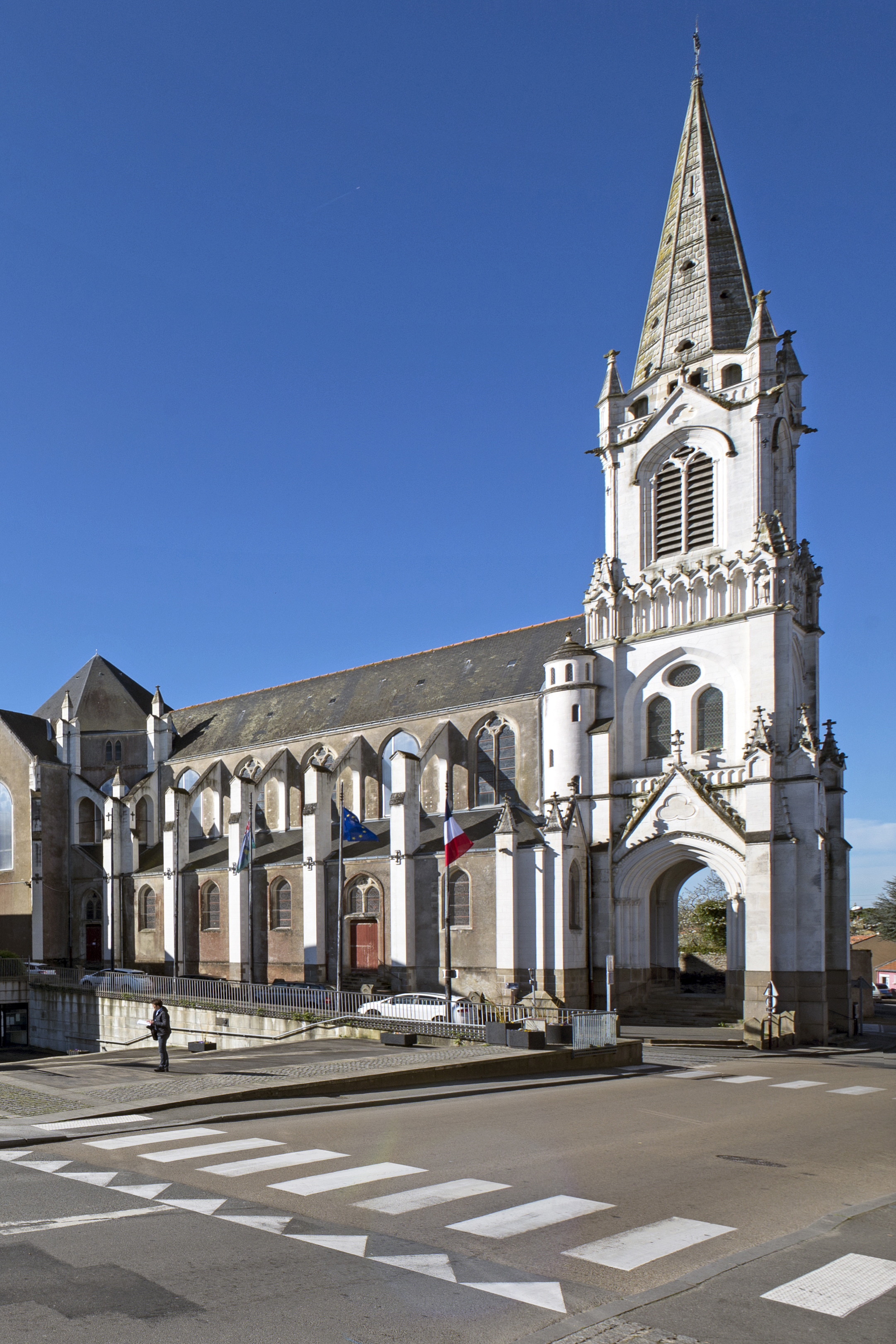 Église Saint-Pierre de Rezé